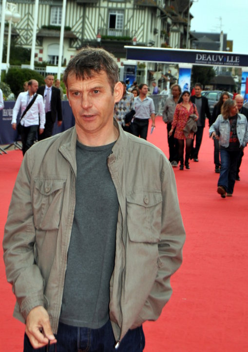 Lucas Belvaux au festival de Deauville